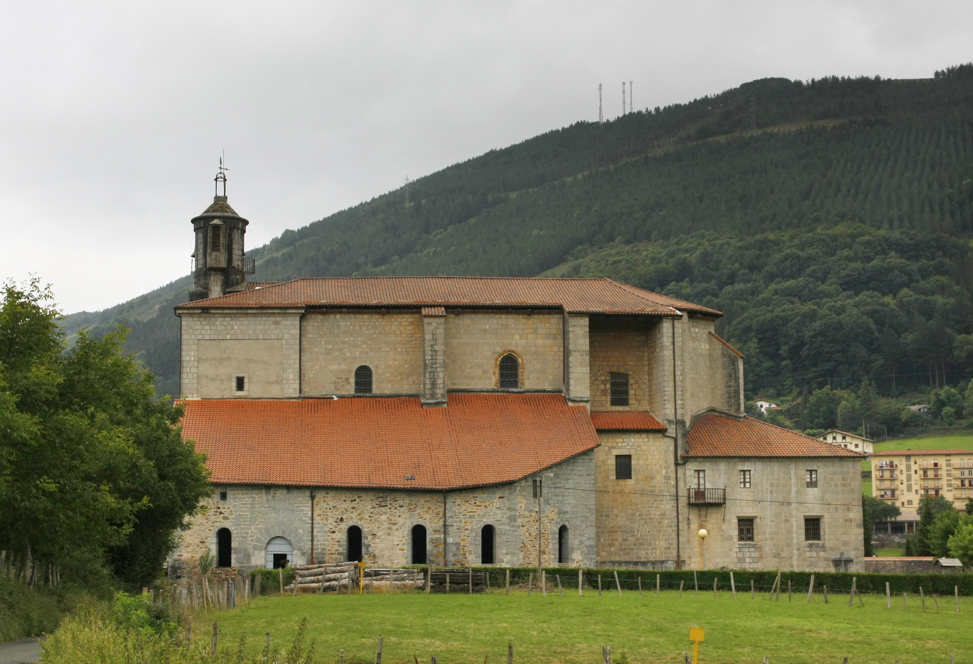 San Martin de Tours eliza - Berastegi